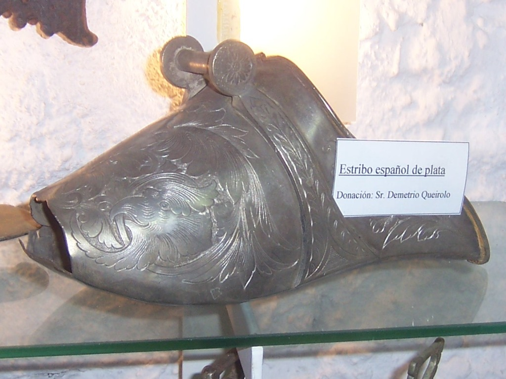 Antiguo estribo español de plata. La imagen corresponde al acervo depositado en el Museo del Indio Washington Escobar, sito en la ciudad de Tacuarembó, capital del departamento del mismo nombre.